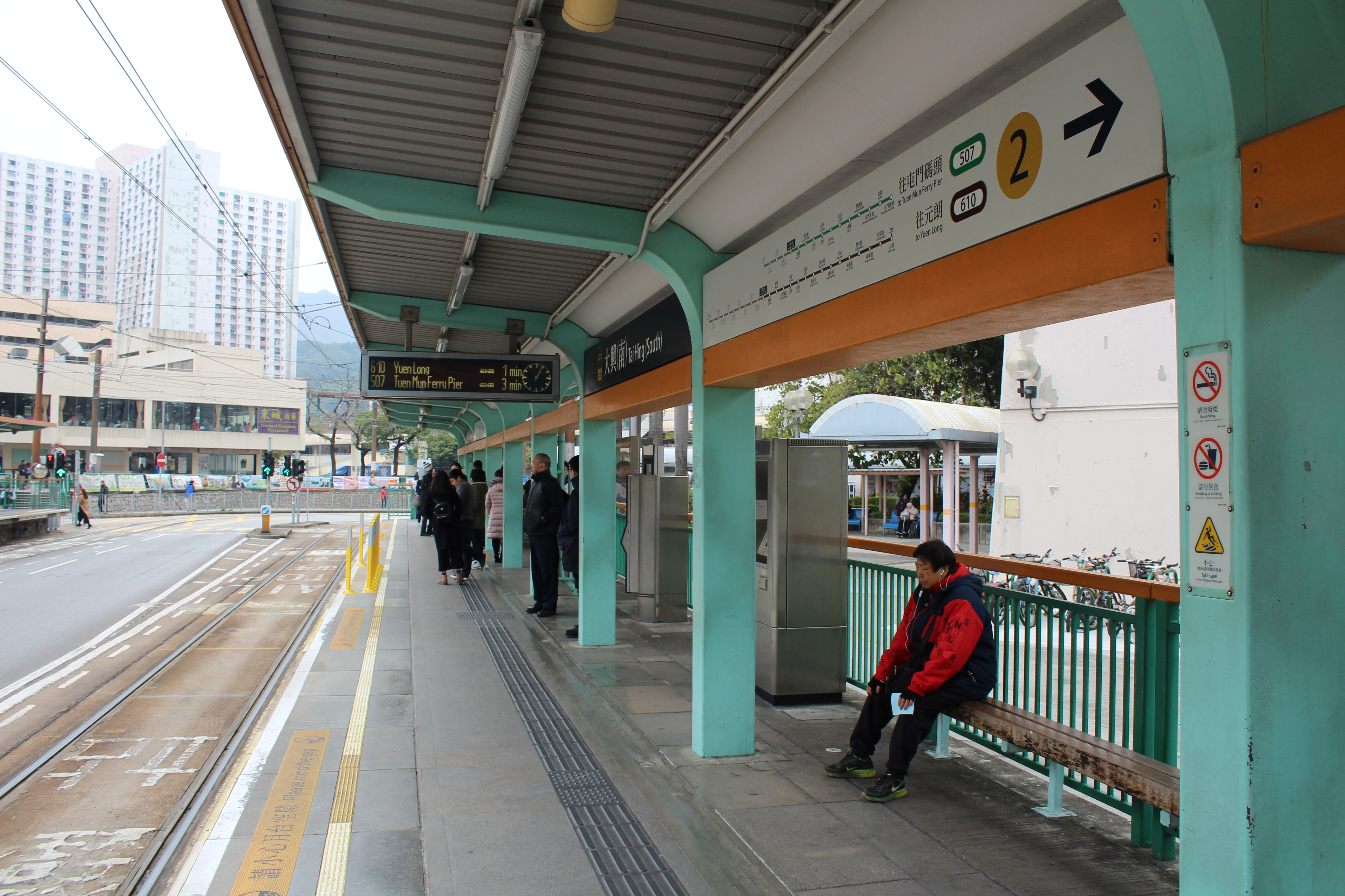 大興（南）站2號月台